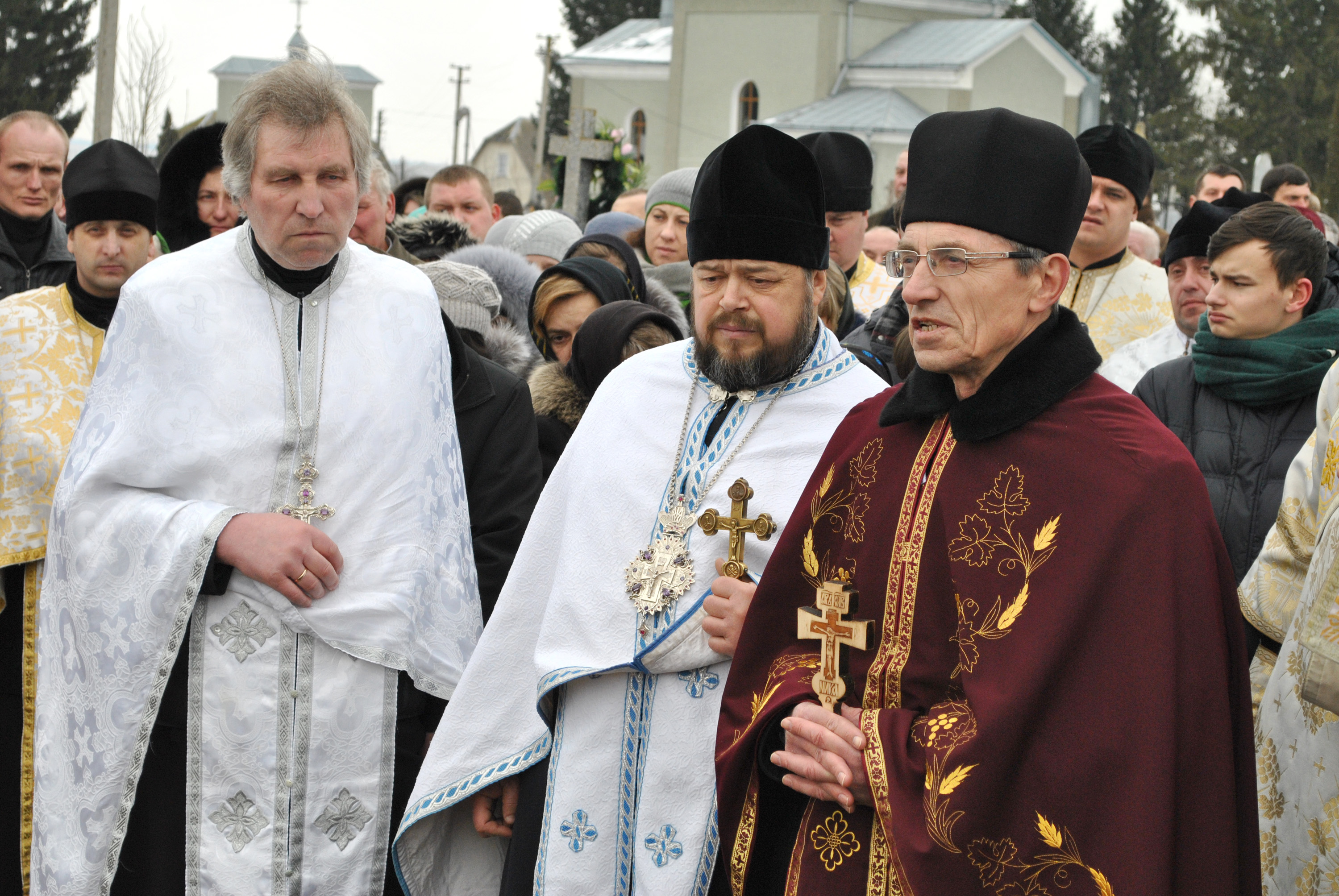 Похорон військовослужбовця 128-ї гірсько-піхотної бригади, уродженця с. Забойки Тернопільського району Тернопільської області Дмитра Заплітного на цвинтарі в його родинному селі 4 лютого 2015 року. Зліва — парох церкви Святого Володимира о. Володимир Простак, справа — о. Орест Глубіш.